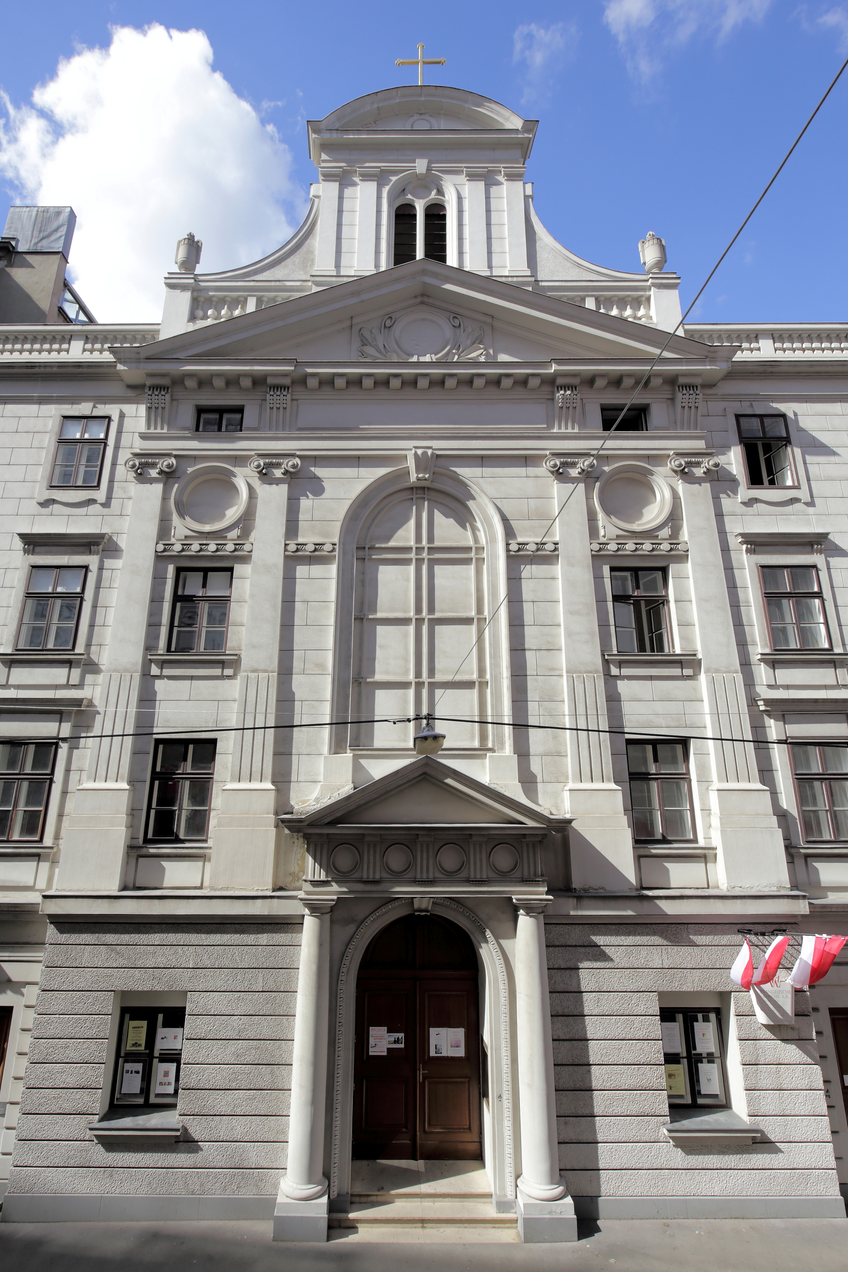 Hauptportal mit Fassade der Lutherischen Stadtkirche in der Dorotheergasse im 1. Wiener Gemeindebezirk Innere Stadt.Die Lutherische Stadtkirche wurde als katholische Klosterkirche des Königinklosters (Kloster der Klarissen) in den Jahren 1582 bis 1583 errichtet. Im Zuge der Josephinische Kirchenreformen wurde das Kloster zwangsweise aufgelöst. Aufgrund des Toleranzpatentes (1781) kaufte die evangelische Gemeinde A.B. 1782/83 einen Teil des Klosters, inklusive der Klosterkirche. Da den Bestimmungen des Toleranzpatents zufolge die Kirche von außen nicht als solche erkennbar sein durfte, wurden unter anderem die drei Kirchtürme abgetragen. Nach dem Erlaß des Protestantenpatentes (Gleichstellung mit der röm.-kath. Kirche, 1861) erfolgte 1876 ein größerer Umbau durch den Architekten Otto Thienemann. Hierbei wurde die Fassade so umgestaltet, dass die Kirche auch von außen als solche erkennbar war. Im Jahr 1907 erfolgte ein neuerlicher Umbau (das Innere der Kirche wurde um 180 Grad gedreht und der Ausgang des Kirchenraums zur Dorotheergasse hin verlegt). Im 2. Weltkrieg wurde die Kirche schwer beschädigt. Im Anschluß erfolgte im Jahr 1948 eine einfache Wiederinstandsetzung. Diese Umgestaltung wurde 1989 rückgängig gemacht und die neoklassizistische Fassade in der Form von 1907 wieder hergestellt.